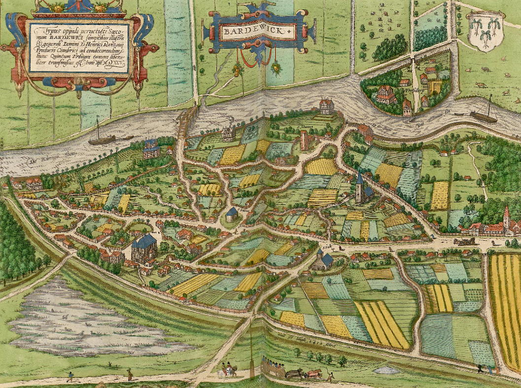 Bardowick von Braun & Hogenberg